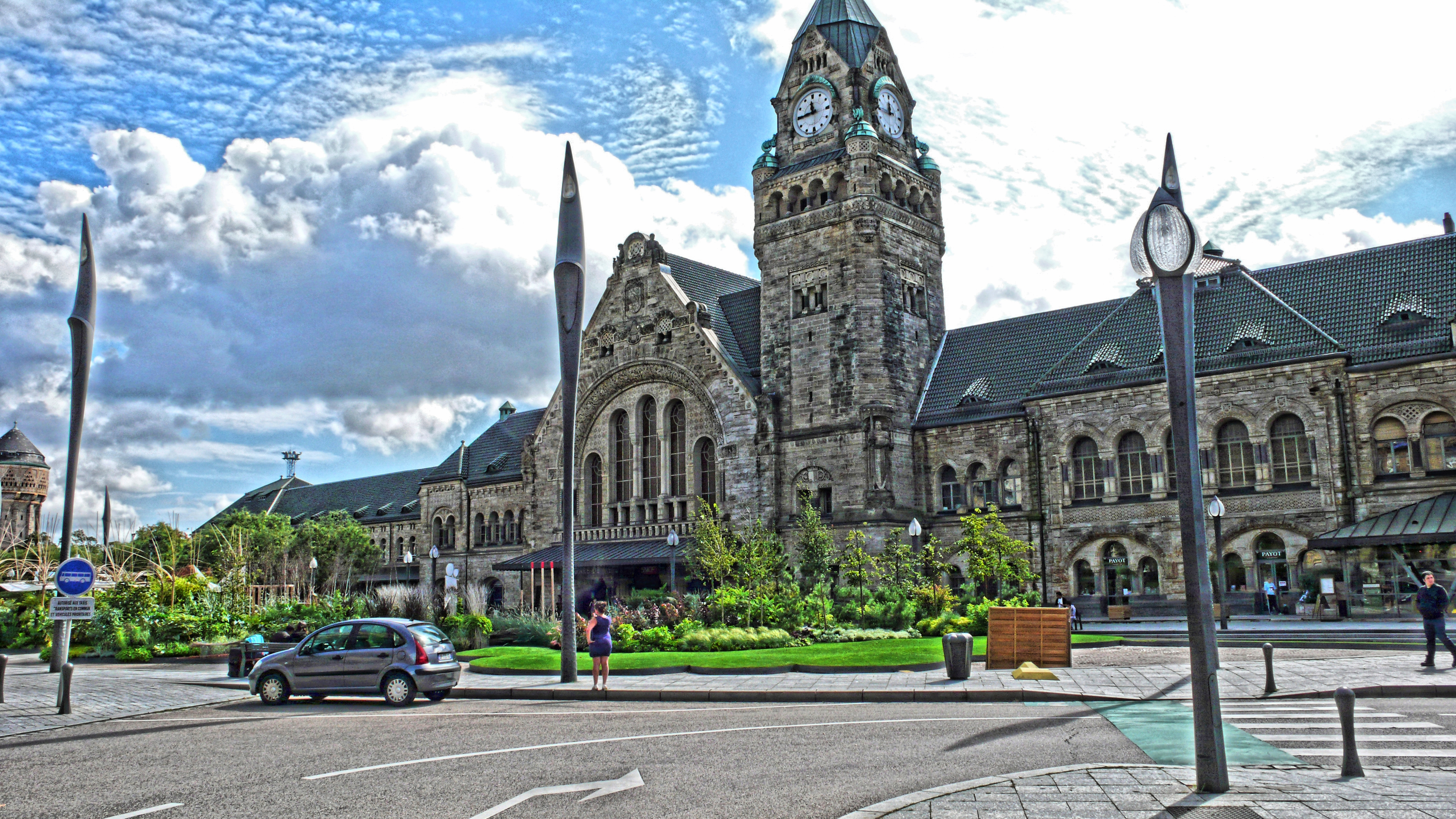 Metz - Gare de Metz